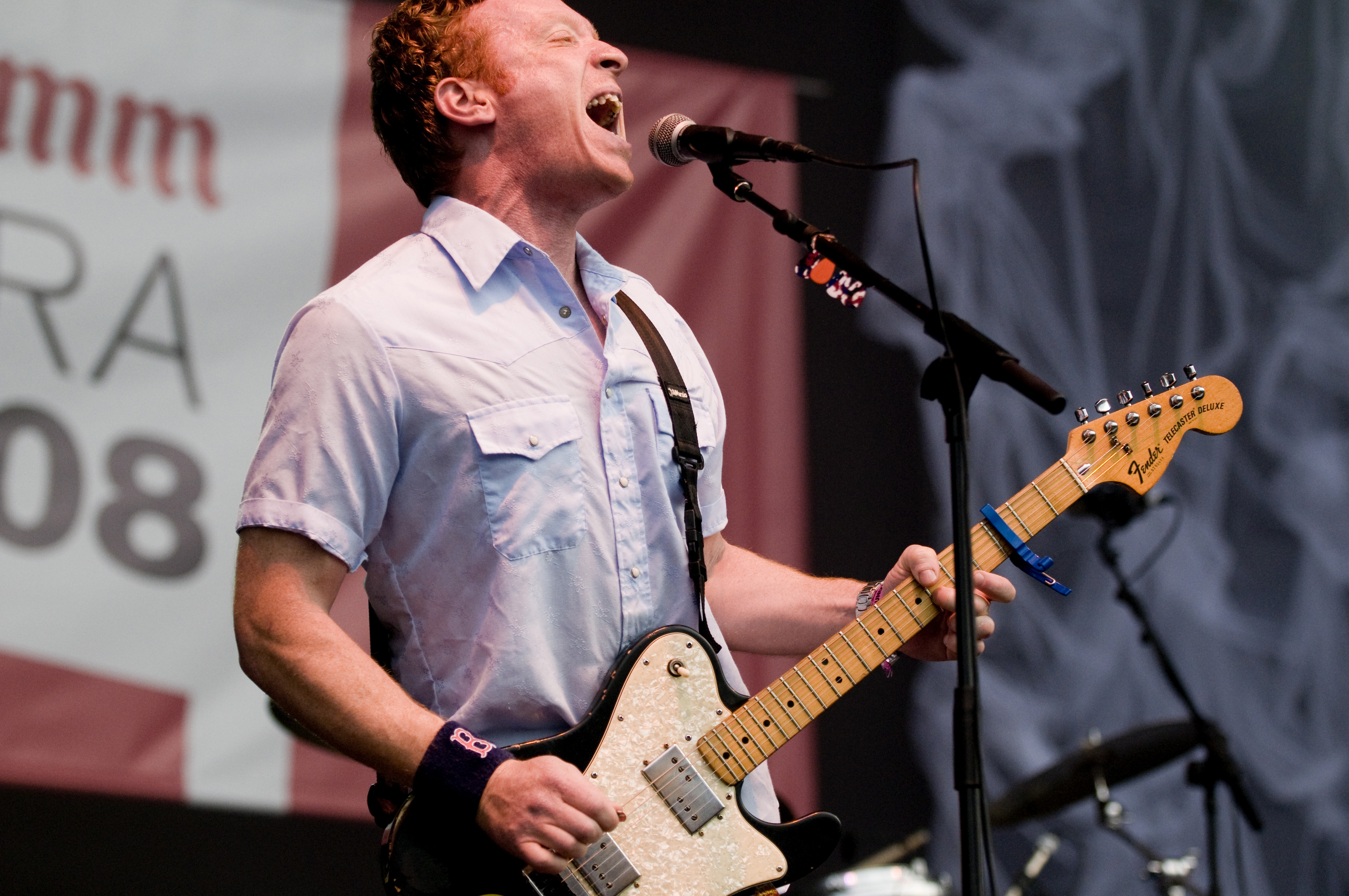 Buffalo Tom